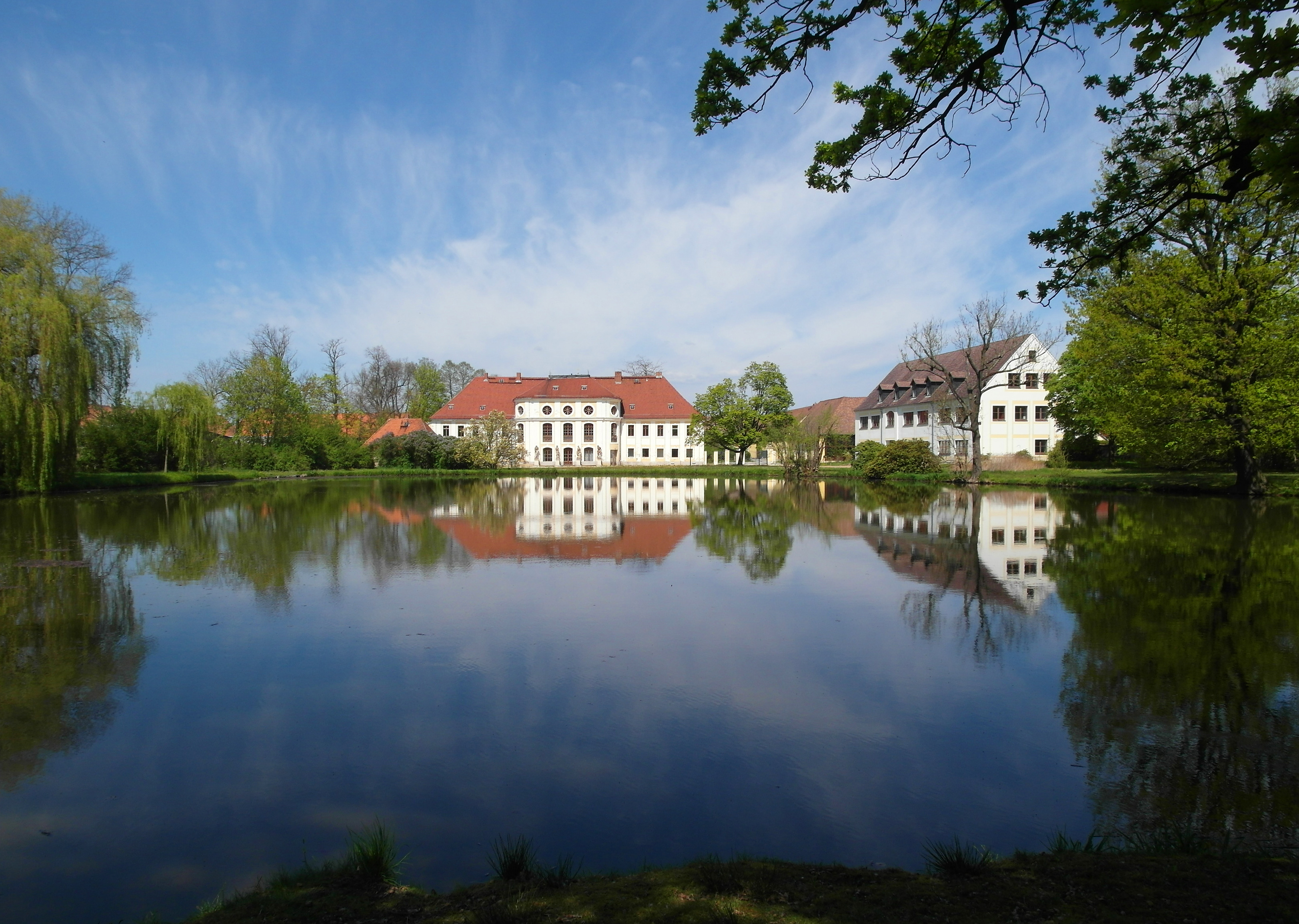 06.05.2016 02699 Königswartha: Schloß, Gutsstraße 1 (GMP: 51.307568,14.326858): Parkseite, Sicht über den Schloßteich. Im westlichen Bereich der heutigen Schloßanlage befand sich bereits im 13. Jh. eine Wasserburg, die als Warte des Königs von Böhmen die alte Straße von Bautzen nach Hoyerswerda sichern sollte. Nach Abriß der Altbebauung wurde das heutige spätbarock-frühklassizistische Schloß von 1780 bis 1796 für Johann Friedrich Graf von Dallwitz errichtet, der im Fertigstellungsjahr starb. Es folgten bürgerliche Besitzer, deren Letzter, Herbert Kluge 1945 enteignet wurde. Seit Ende der 1940er Jahre dient das Schloß u.a. der Fachschule für Binnenfischerei. [SAM5692.JPG]20160606410DR.JPG(c)Blobelt Hornjoserbsce: Rakečanski hród